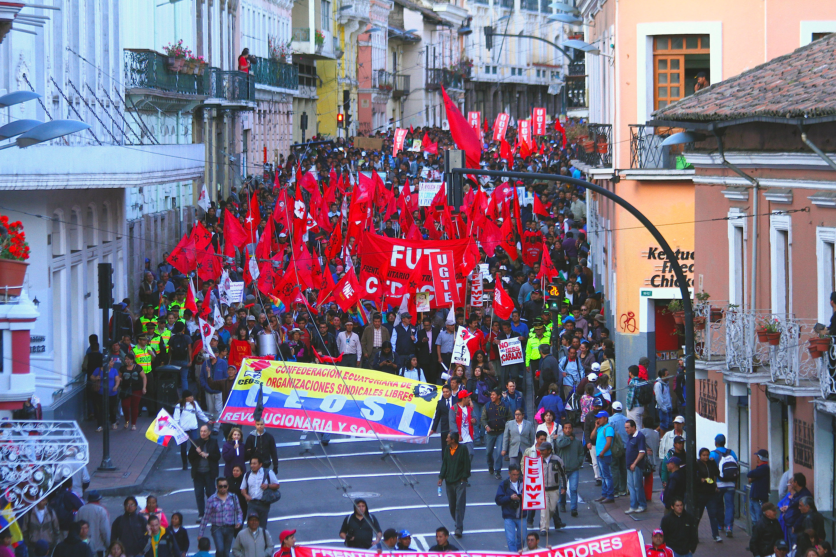 Diferentes organizaciones sociales y grupos sindicales marcharon por las calles de Quito en el centro histórico con consignas en contra del gobierno central.